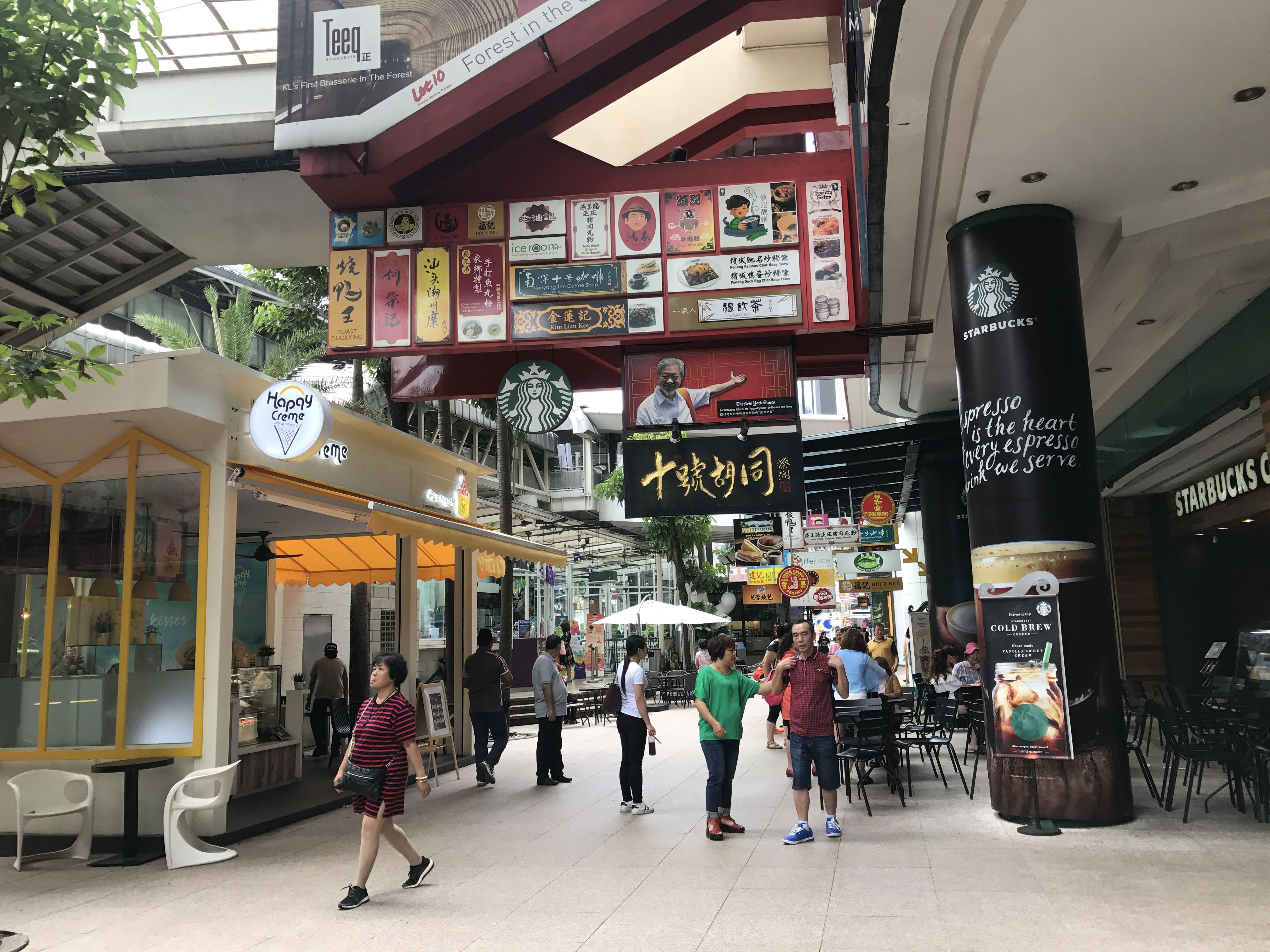 Outside Lot 10 Kuala Lumpur 1